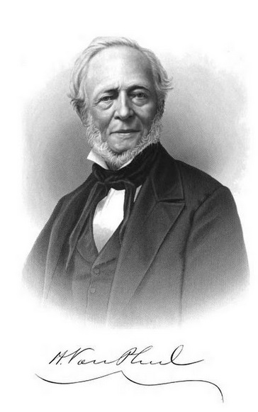 Henry von Phul (Pfuel) (1784-1874), amerikanischer Pionier der vor allem in St. Louis wirkte. Sohn des Johann Wilhelm von Phull (Phul) (1739–1793), Hauptmann im Stab des Generals George Washington, der 1764 nach Amerika auswanderte, Bruder der amerikanischen Künstlerin Anna Maria von Phul (1786–1823)